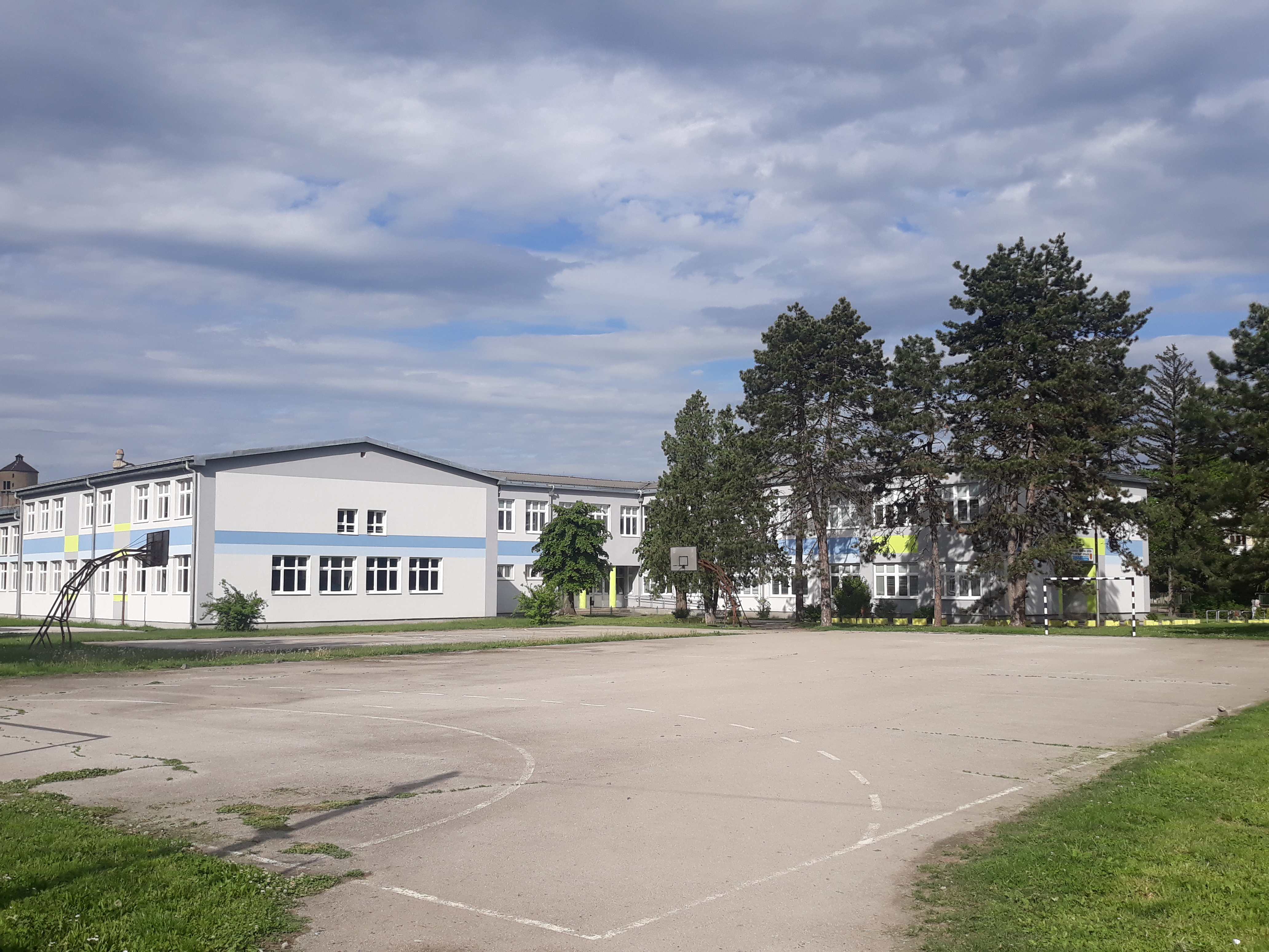 Машинска техничка школа „14. октобар“ Краљево